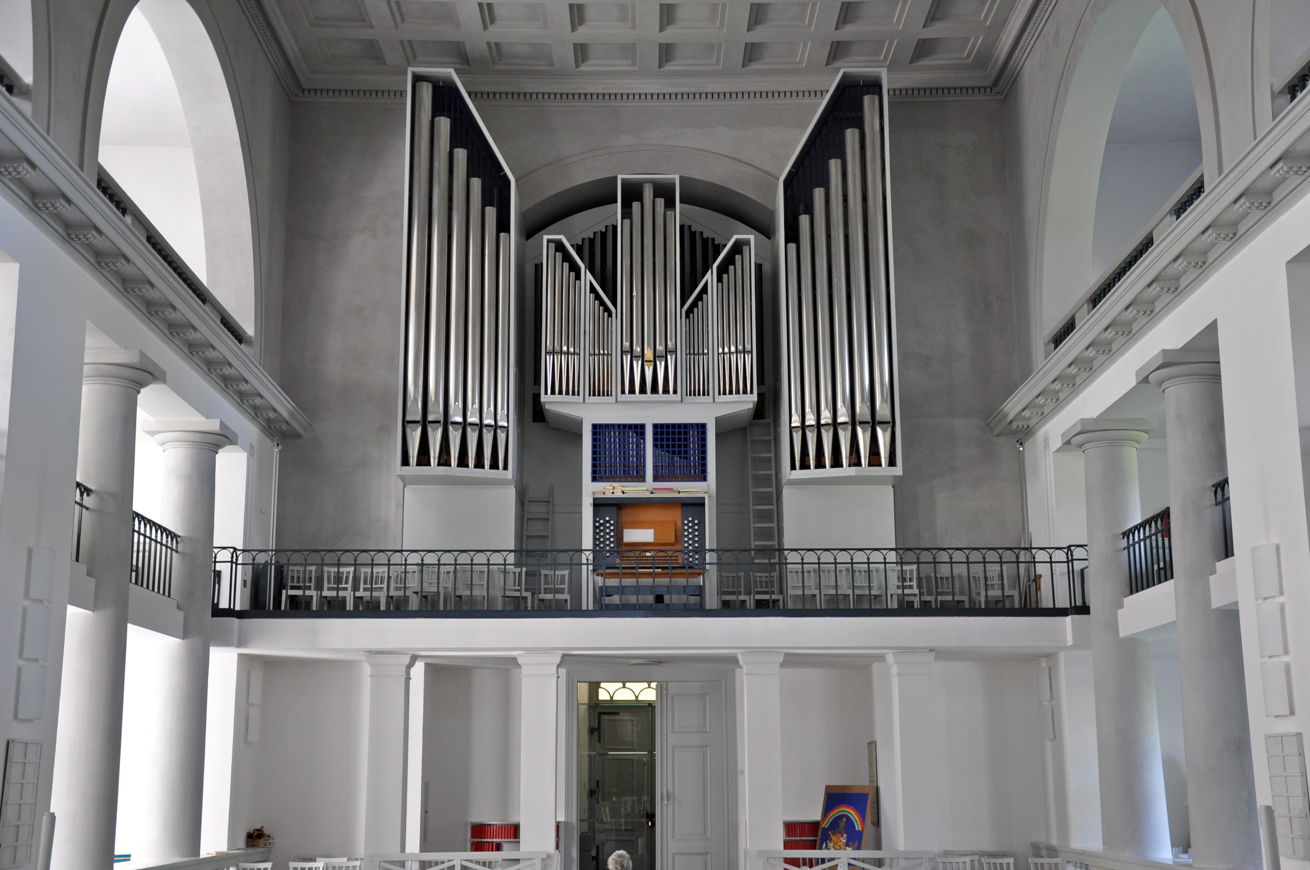 Orgel St. Vicelinkirche, Neumünster, Schleswig-Holstein, Deutschland